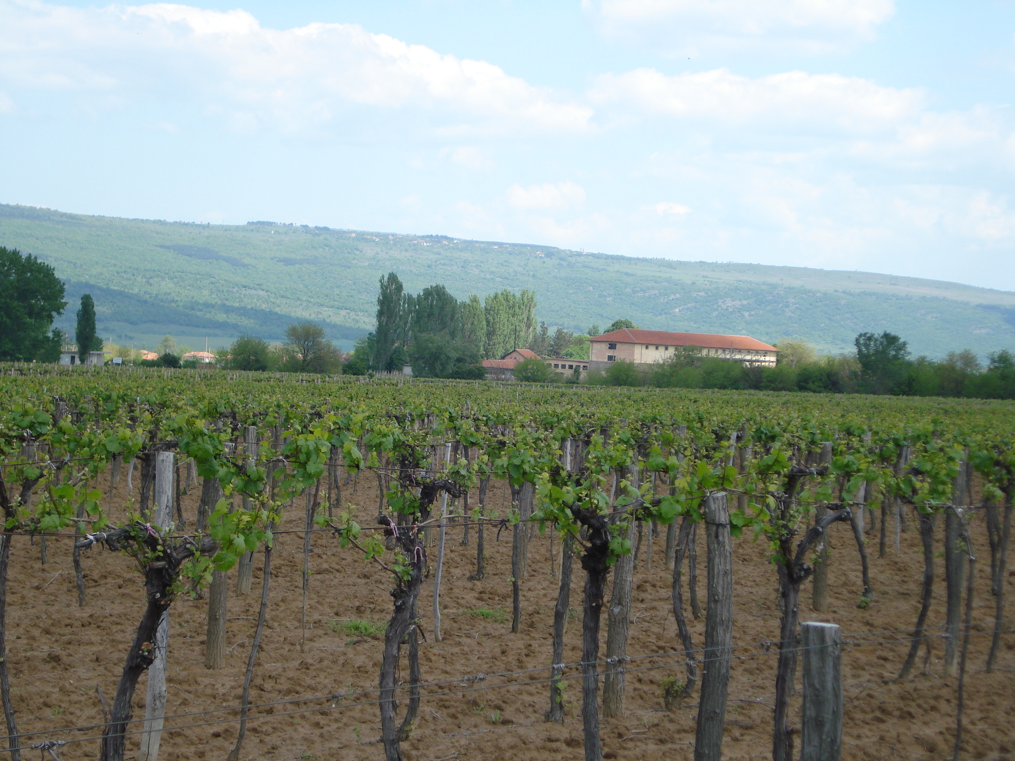 с.Пъдарево - лозя и Винпром